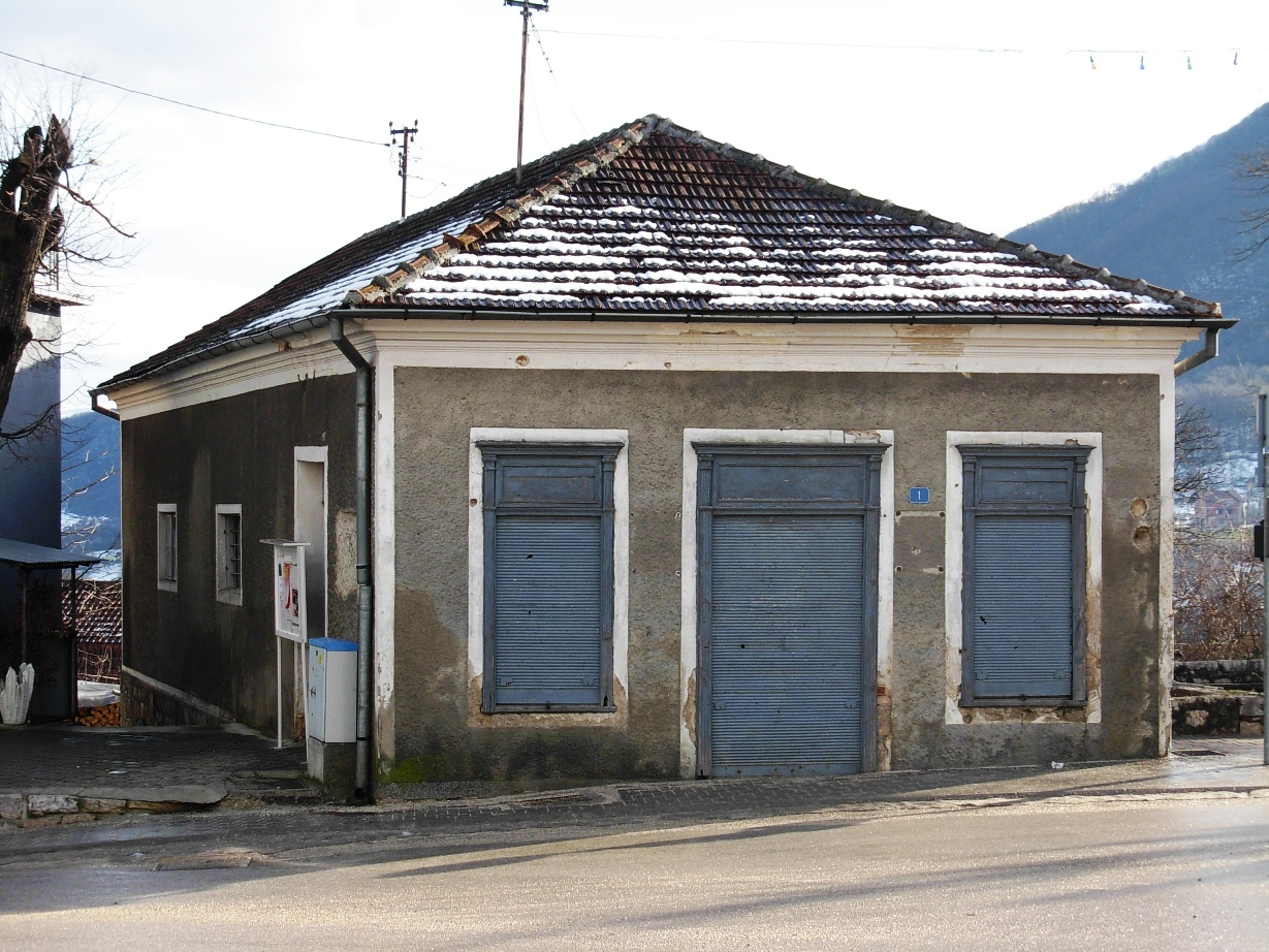 Kuća-muzej u kojoj je održano Prvo zasjedanje ZAVNOBiH-a, Mrkonjić Grad, BiH.